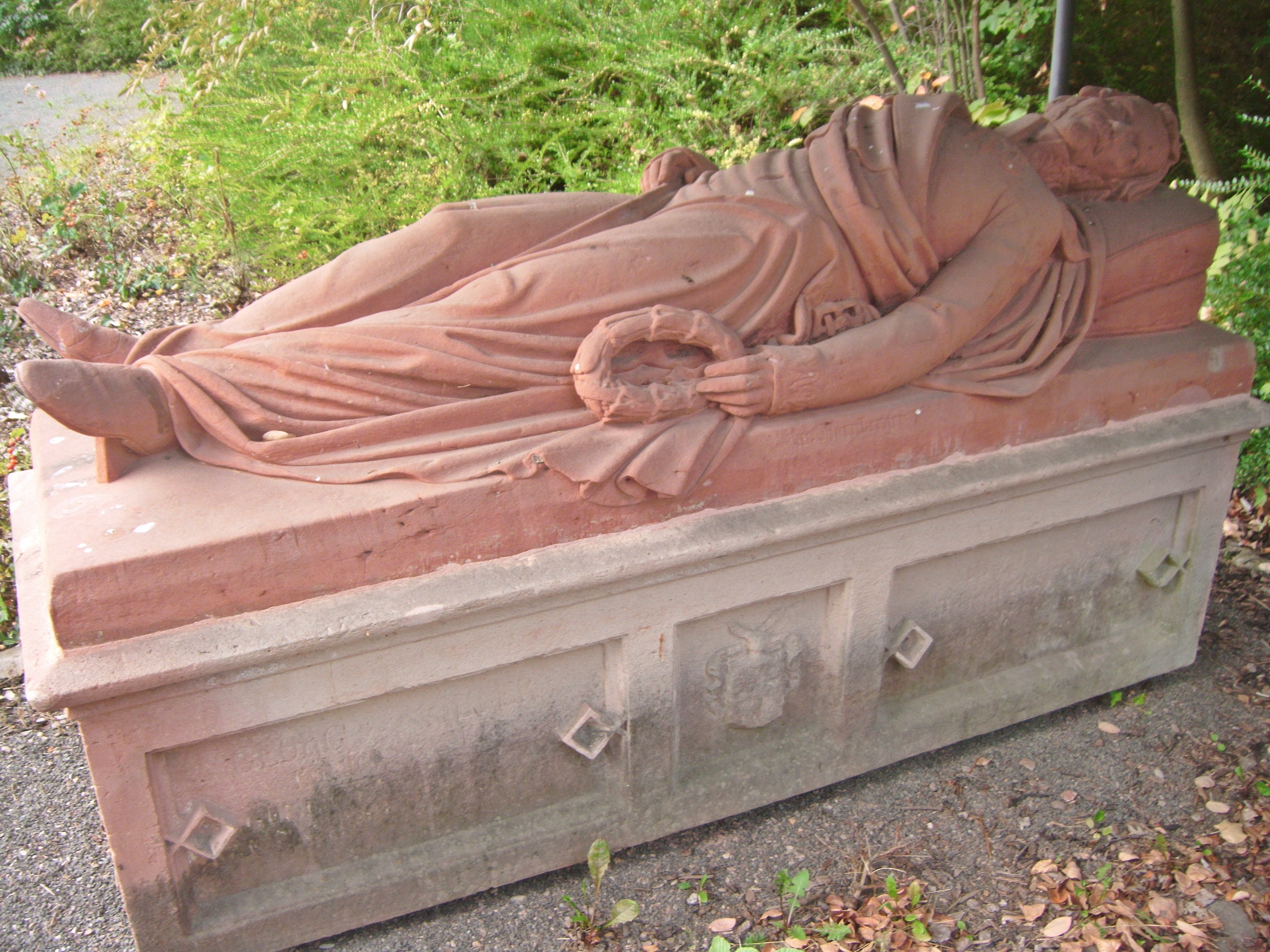 Georg von Mölter (1775-1846) bayerischer Generalmajor und Kommandant der Festung Landau (Pfalz), Grabmal, Friedhof Landau